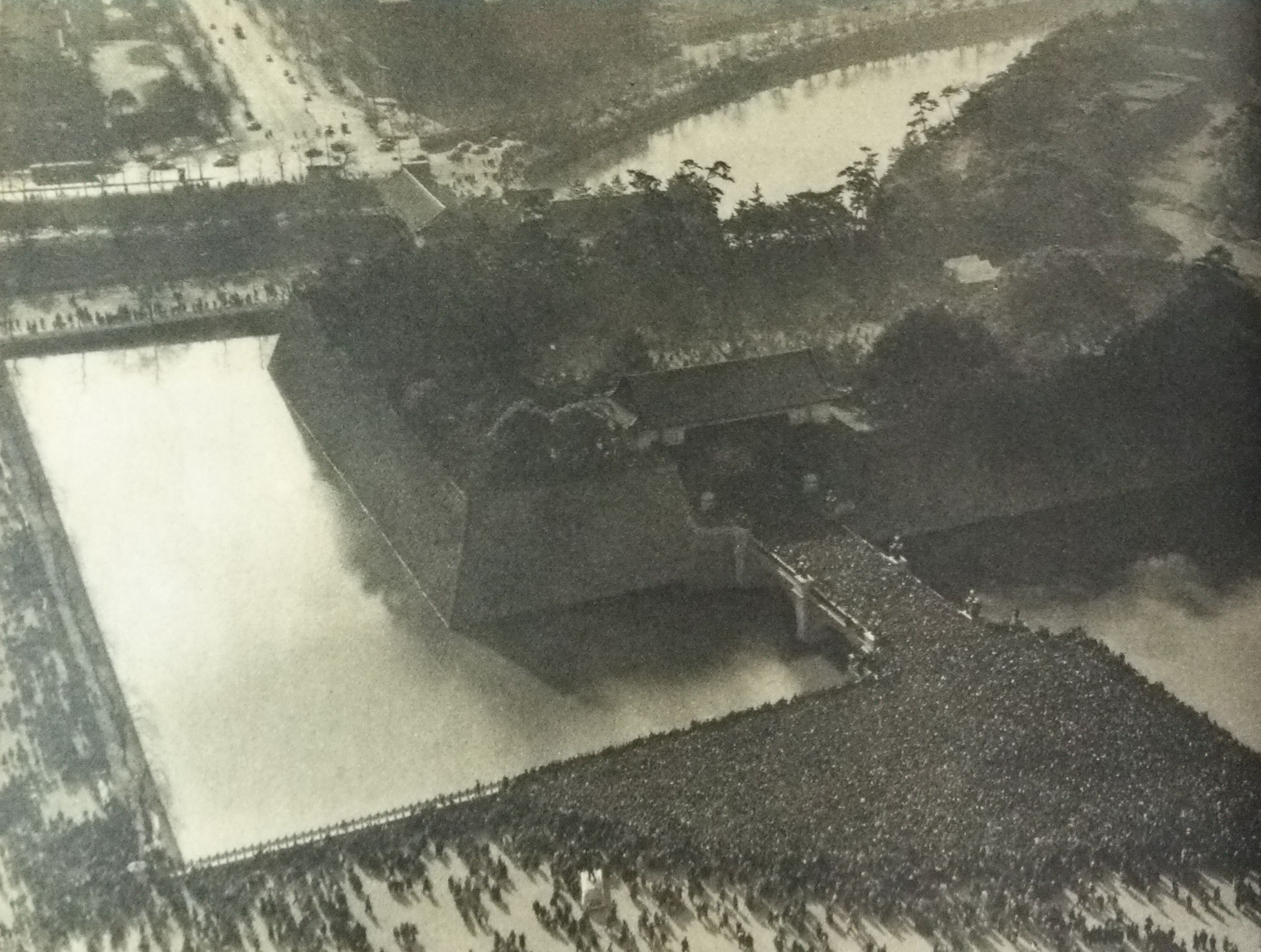 二重橋事件の直前